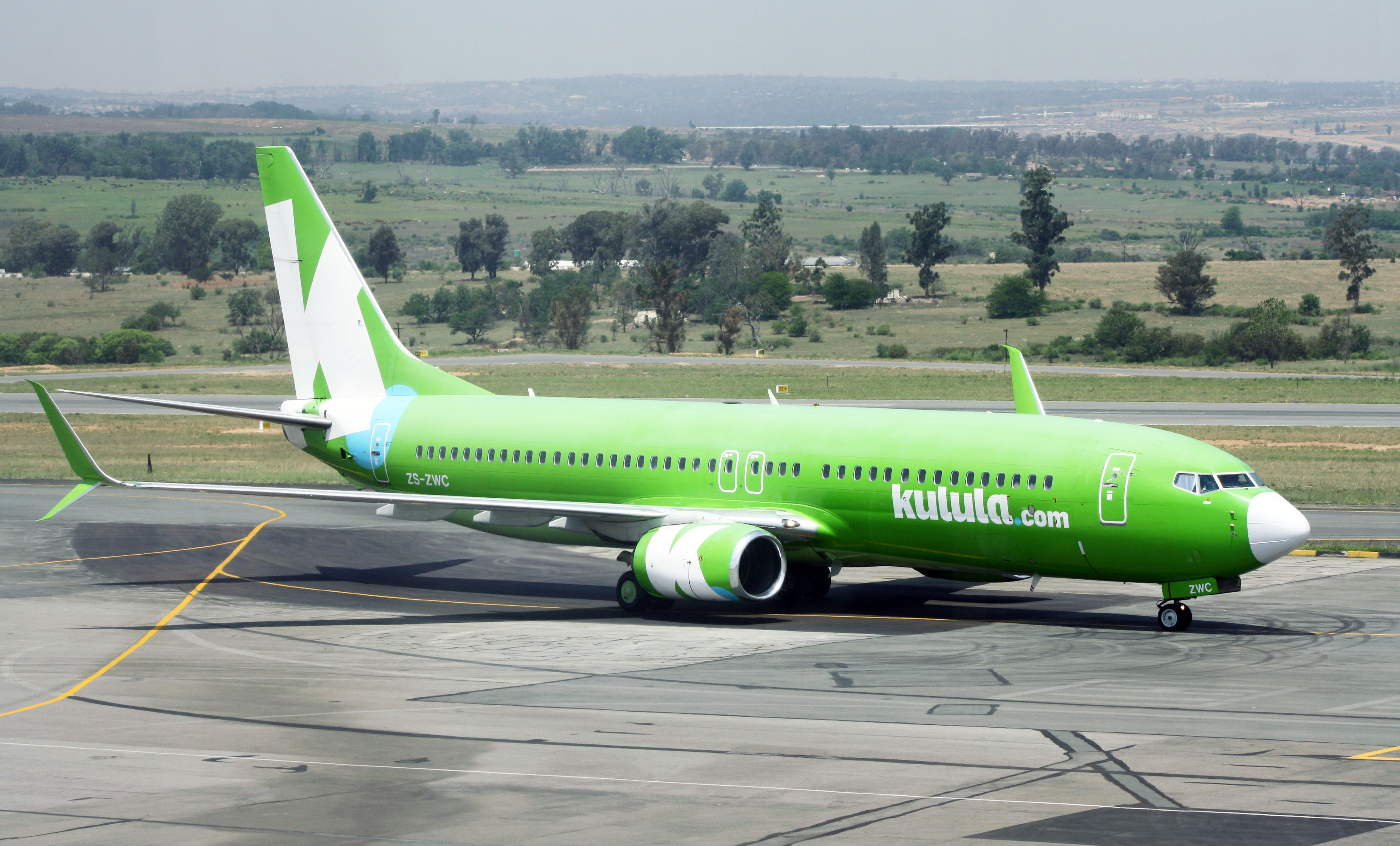 Kulula B737-8LD ZS-ZWC